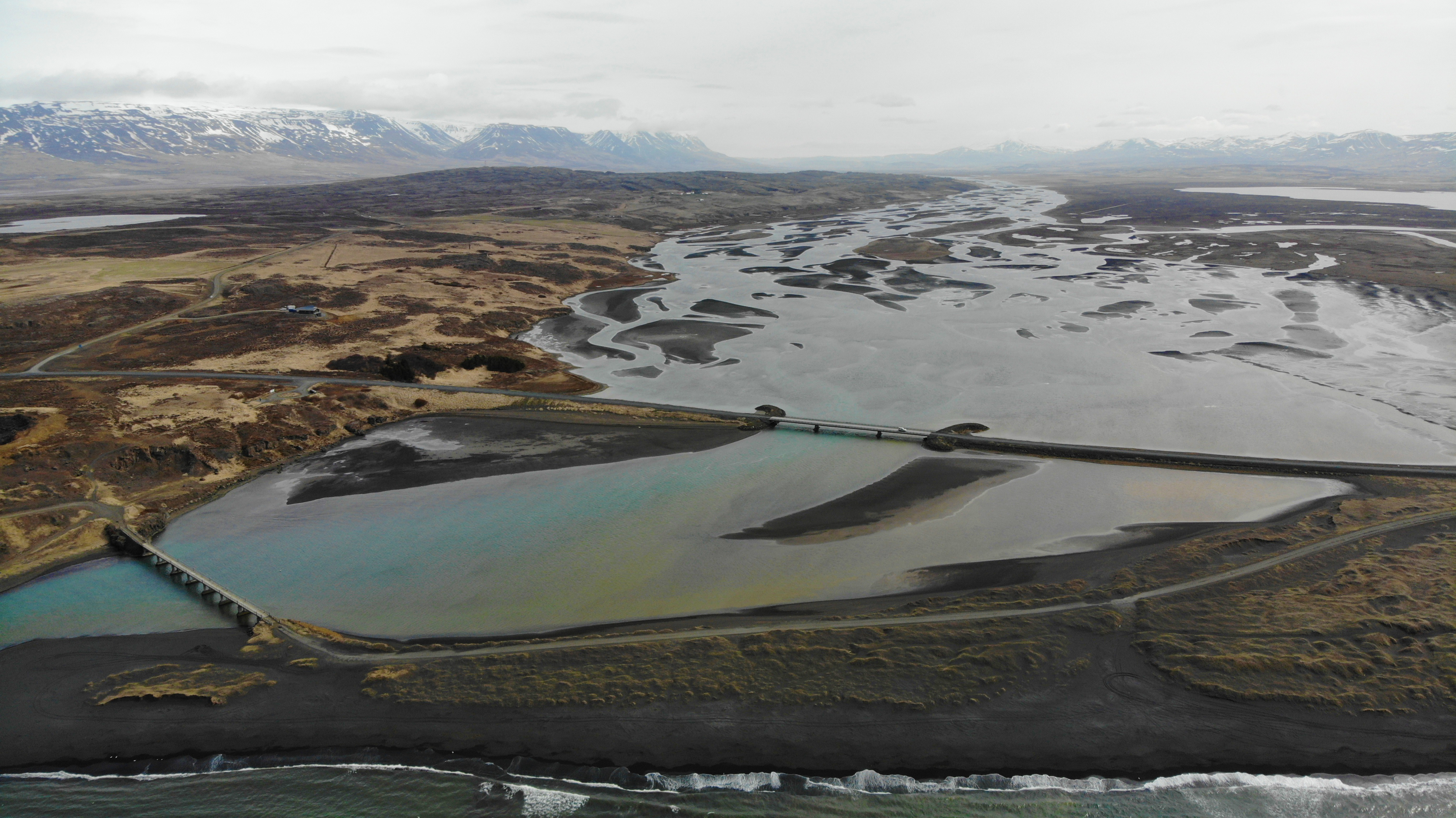 Mündungsgebiet des Héraðsvötn östlich von Sauðárkrókur.